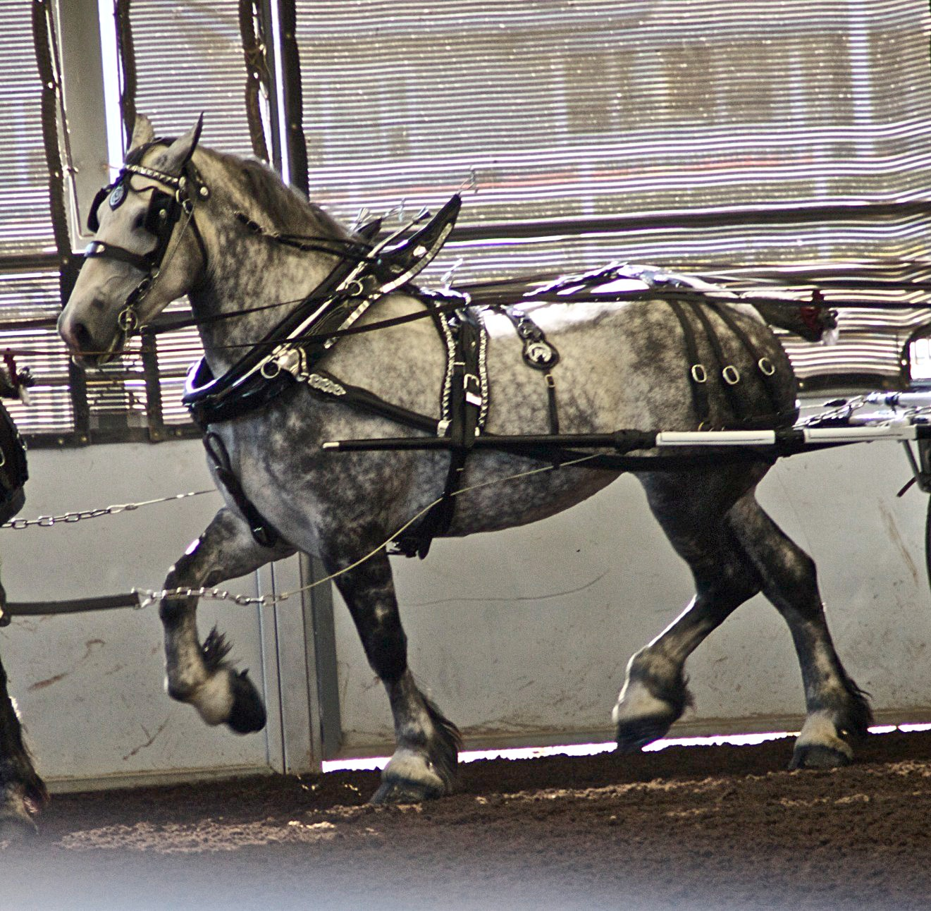 Percheron